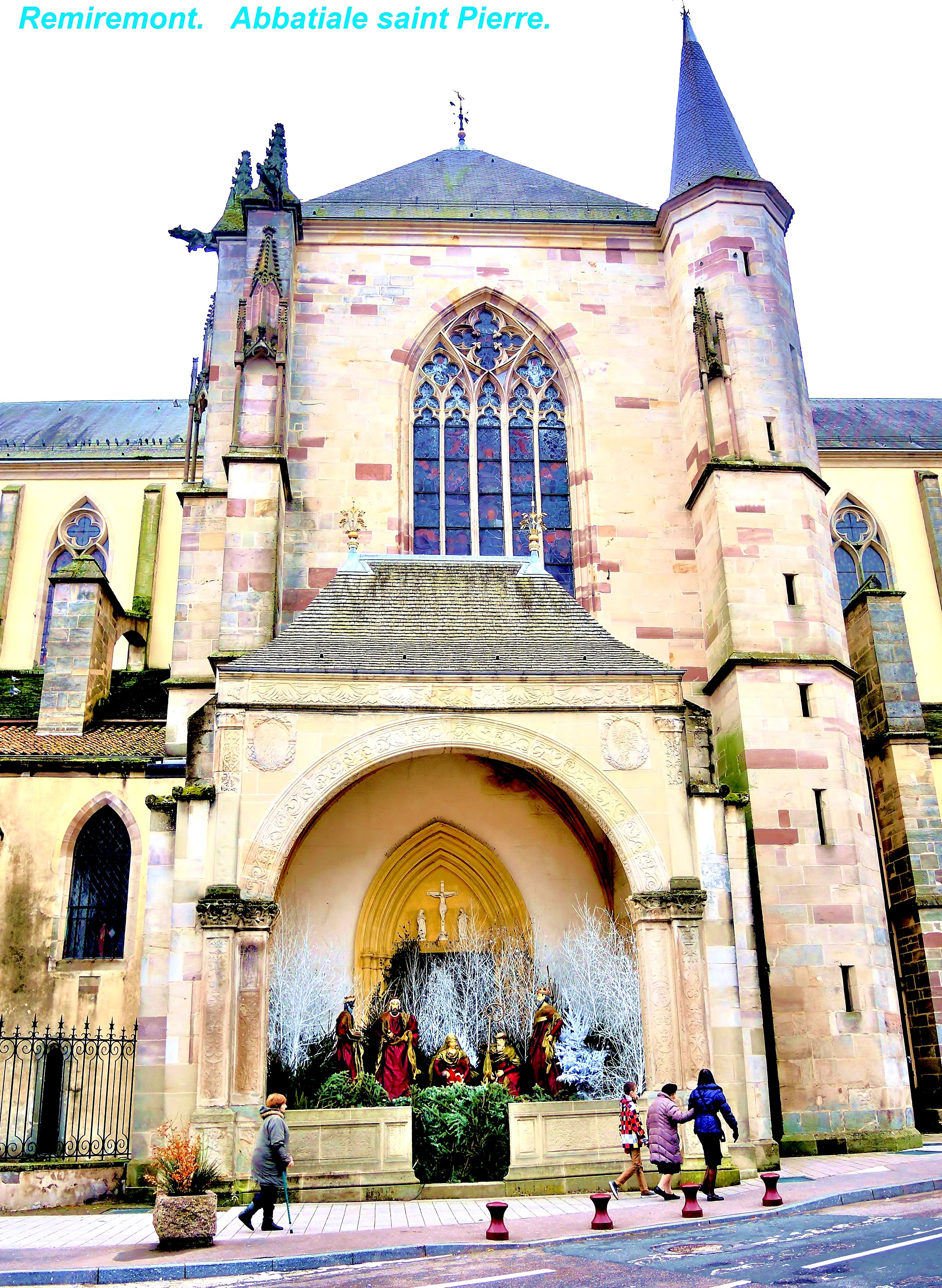 Façade Ouest de l'église abbatiale de la ville de Remiremont. Vosges.